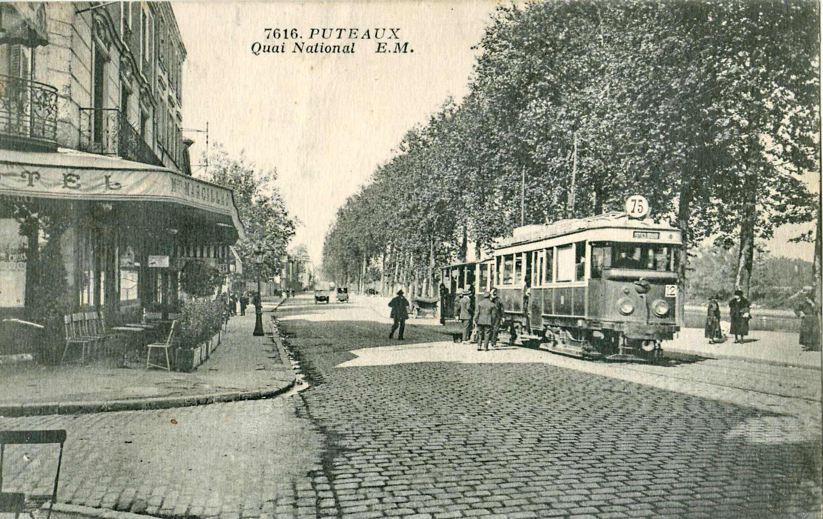 Carte postale ancienne éditée par EM, n°7616 :PUTEAUX - Quai National.Vue en gros plan d'un tramway de la ligne 75 de la STCRP pour Saint-Cloud.